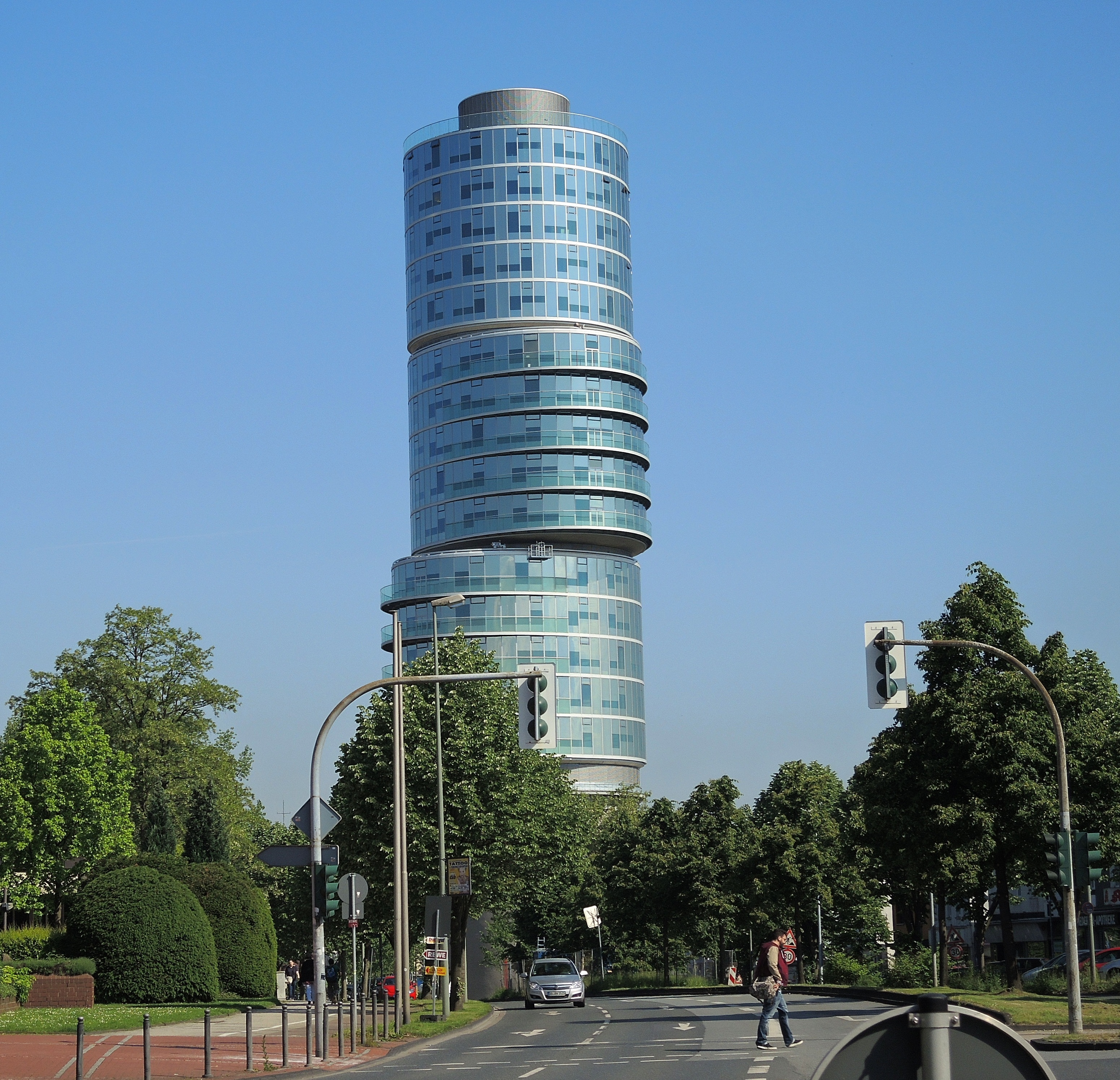 Das gerade fertig gebaute Exzenterhaus in Bochum.